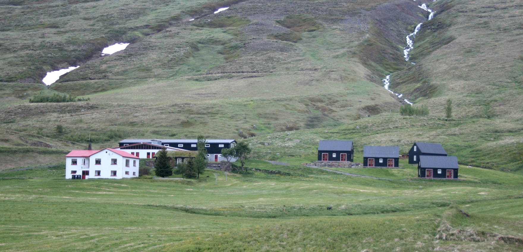 Klængshóll í Skíðadal